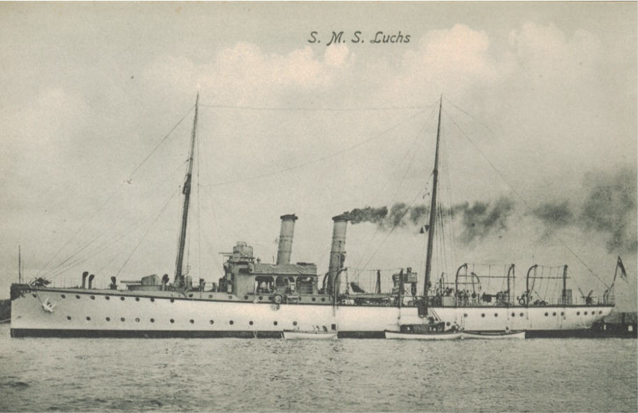 Postkarte von SMS Luchs, ca. 1905